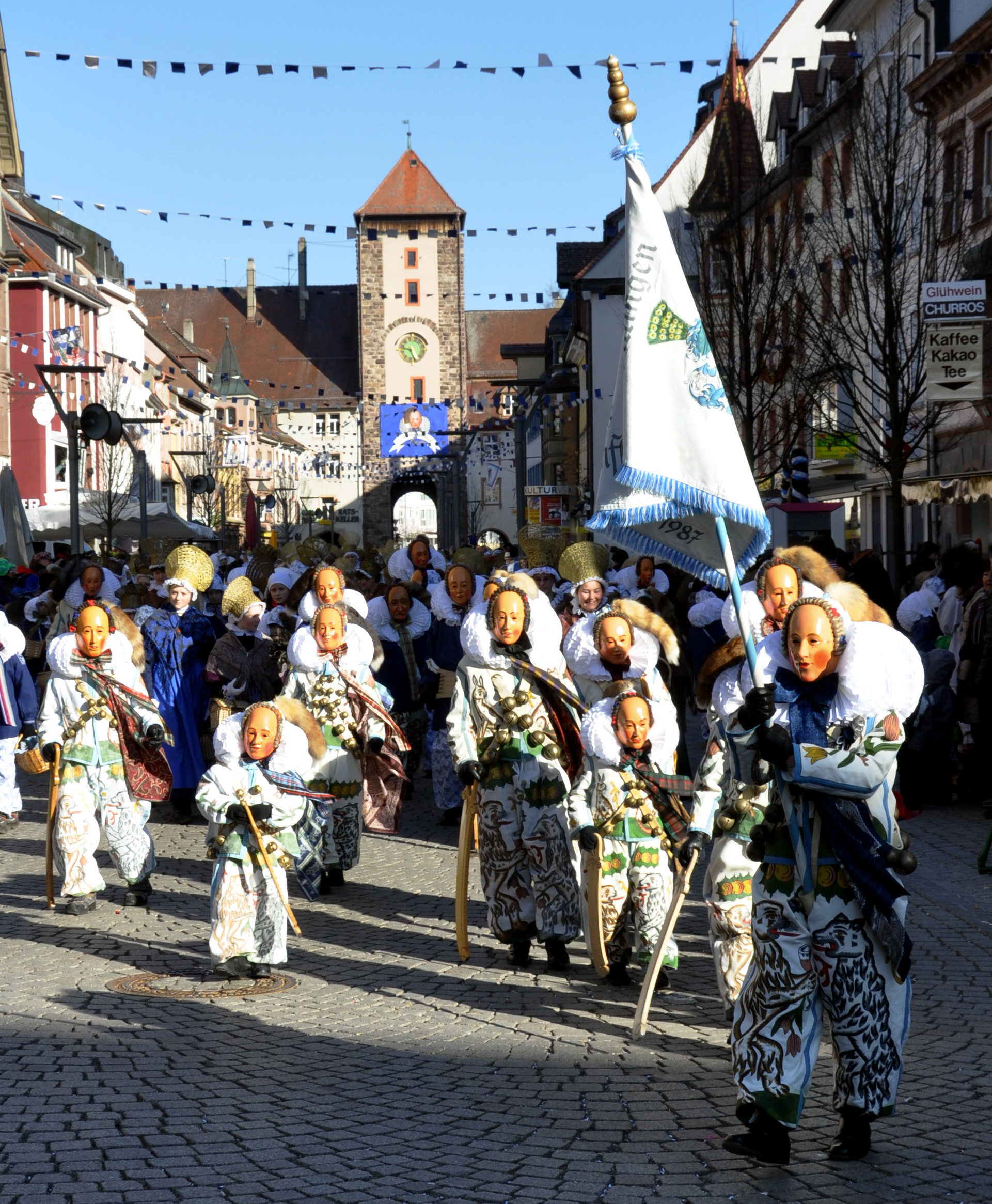 Historischer Umzug der Narrozunft Villingen, Fasnetsmontag 2011 Fahne der Narrozunft und Narros